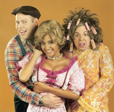 דומינו גרוס. מימין לשמאל: רועי בר-נתן, שגית סול ואדיר מילר